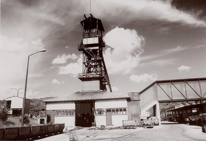 kno rudnika Tupljak - posljednjeg ugljenokopa u Hrvatskoj